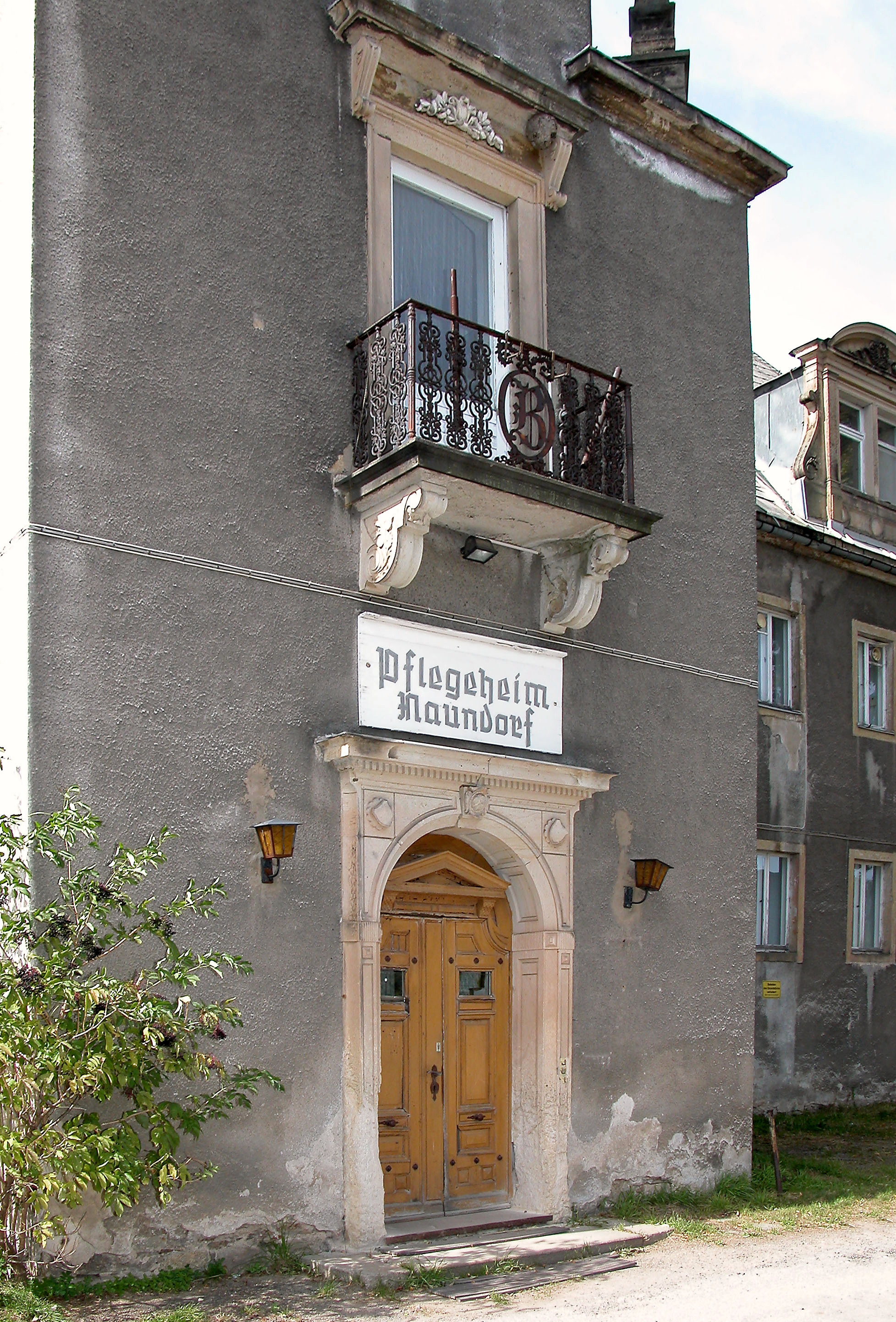 18.09.2004 01762 Naundorf (Dippoldiswalde), Schloßberg 1: Rittergut, Schloß (GMP: 50.840676,13.656128). Der Hauptflügel ist in der zweiten Hälfte des 17. Jahrhunderts für die Familie von Bünau erbaut worden. Der im Turm befindliche Treppenaufgang führt zu einem älteren Sandsteinportal, welches auf 1608 datiert ist und das Monogramm des Rittergutsbesitzers Wolf von Schönberg zeigt. Dieses Portal könnte aus dem Vorgängerbau stammen und wiederverwendet worden sein. Albert von Carlowitz verkaufte das Rittergut 1846 an den Fabrikanten Wilhelm Eduard Otto. Unter seiner Herrschaft wurde der Landschaftspark gegenüber dem Rittergutshof angelegt. Auf einer Anhöhe ließ der Schloßbesitzer 1865 bis 1867 Ottos Eck errichten. Nach Ottos Tod wurde das Rittergut 1897 an Oskar Bierling verkauft. Der Dresdner Lederfabrikant hat das Schloß ausbauen und erweitern lassen. 1949 bis 1998 diente es als Pflegeheim. Seitdem steht der Herrensitz leer. Portal. [DSCN5065]20040918380DR.JPG(c)Blobelt